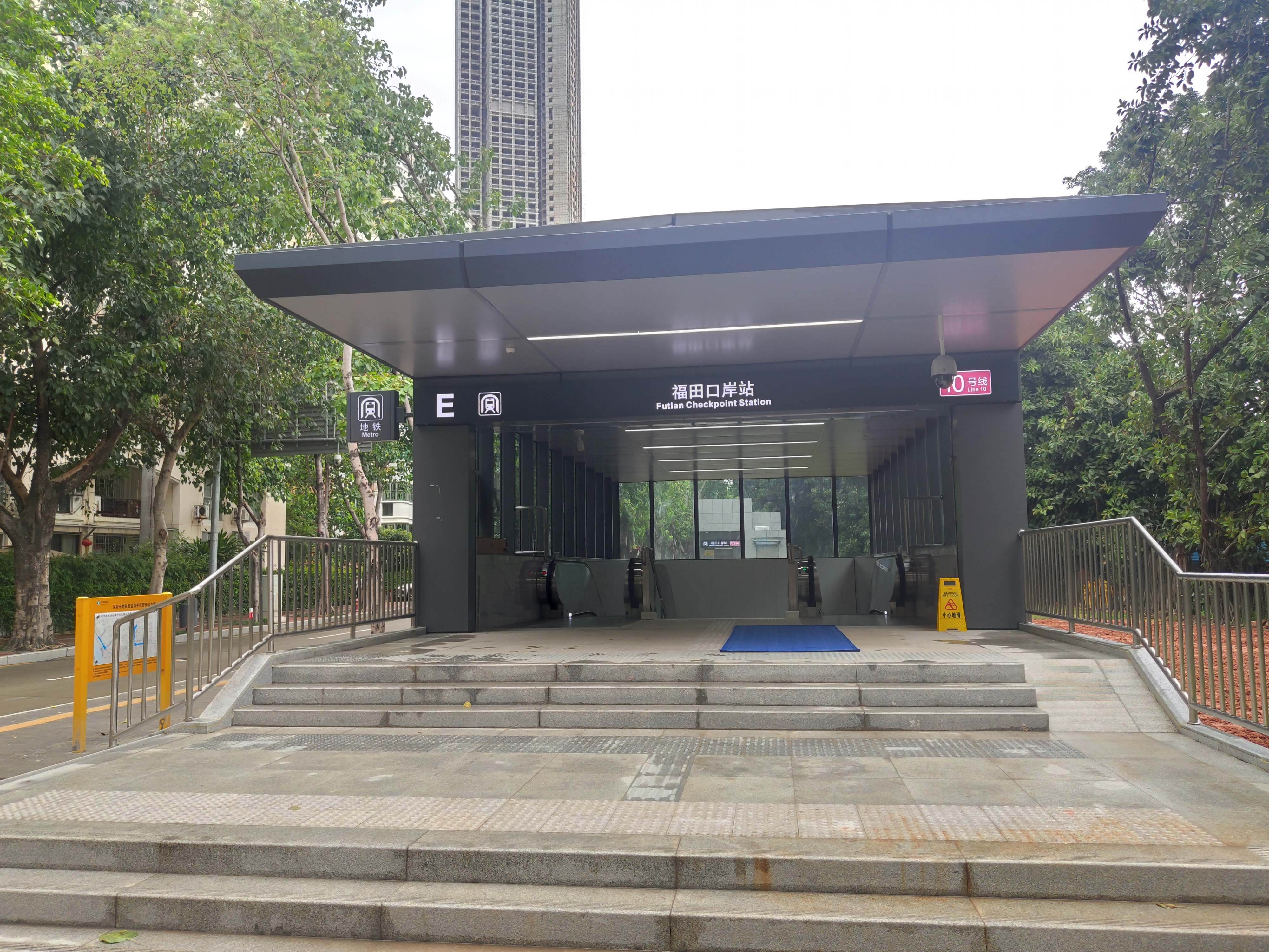 深圳地铁10号线福田口岸站E出口